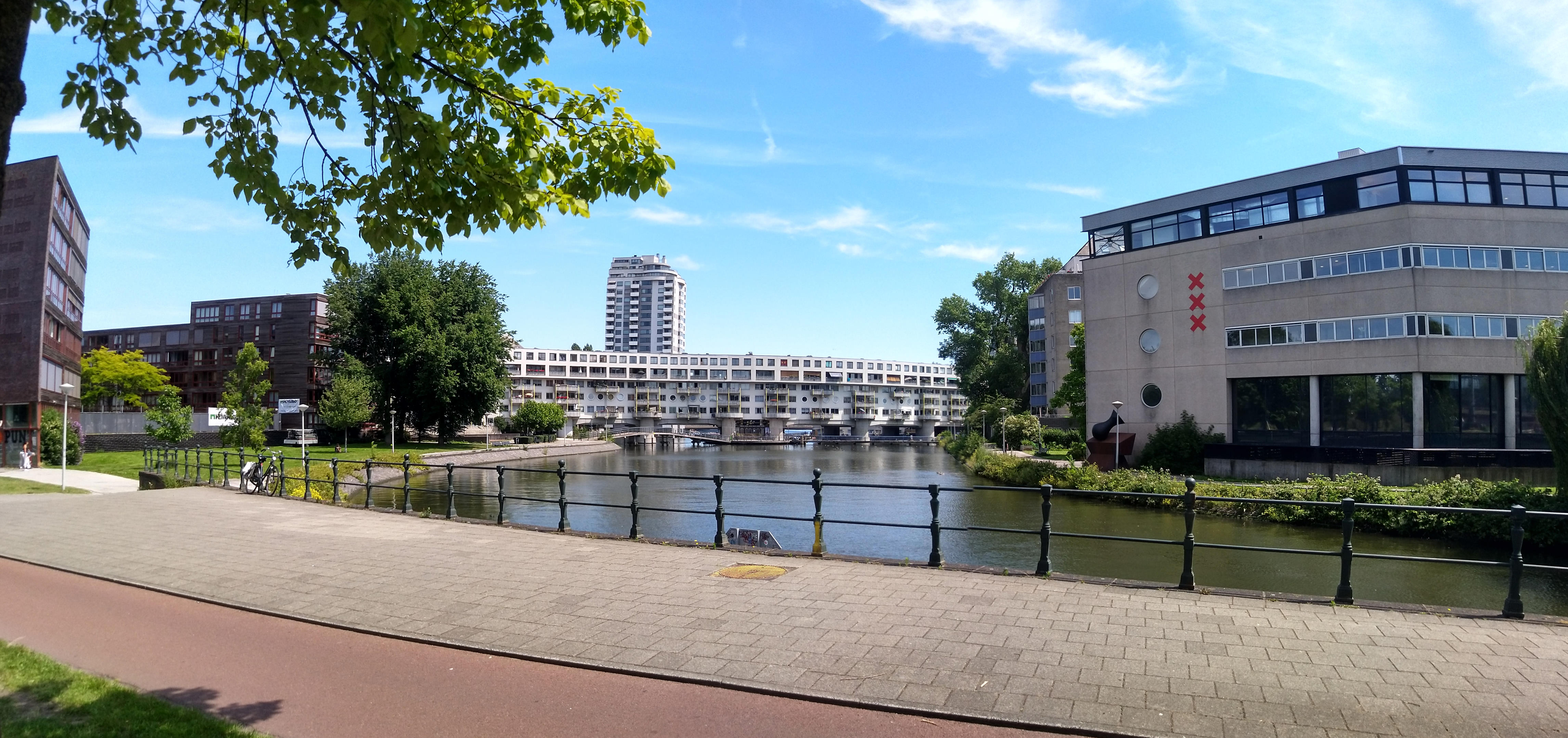 Entrepothaven, Amsterdam, vanuit Panamalaan, 24 Juni 2020